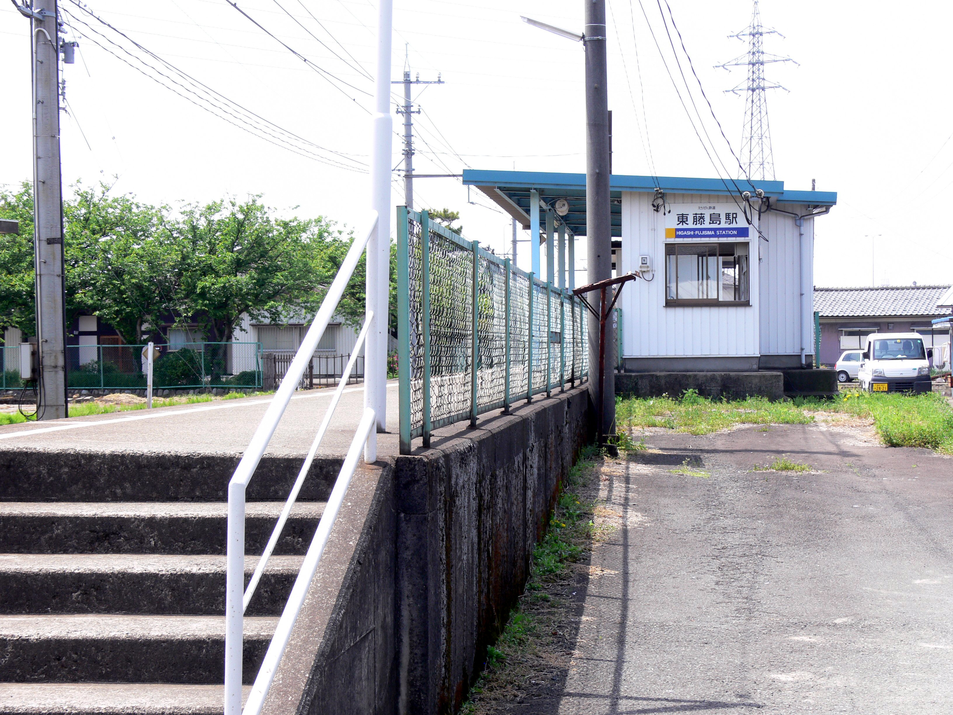 Higashi-Fujishima Station